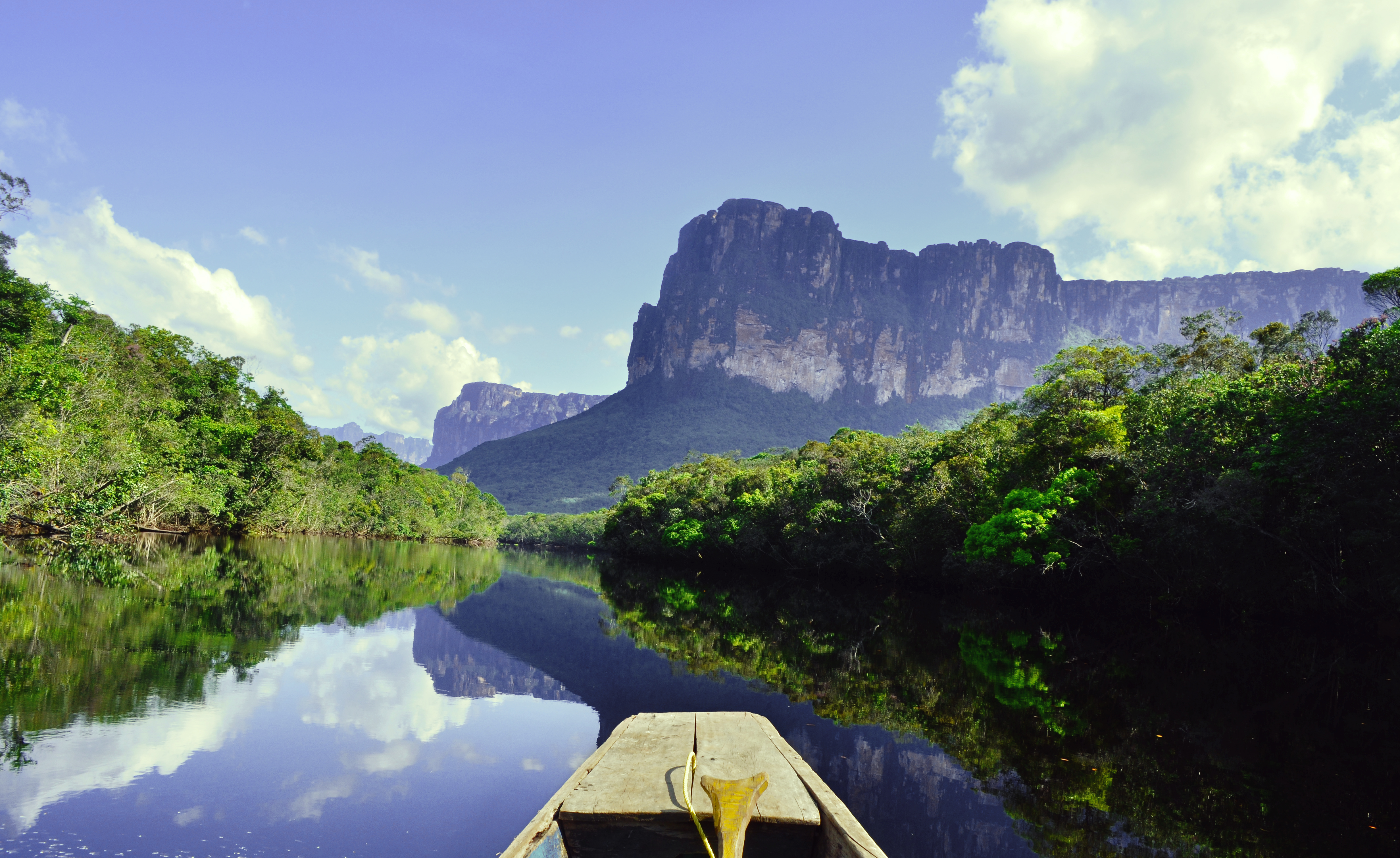 A bordo de una curiara (bote indígena) sobre el río Carrao en dirección al Kerepakupai Vená (Salto Ángel)